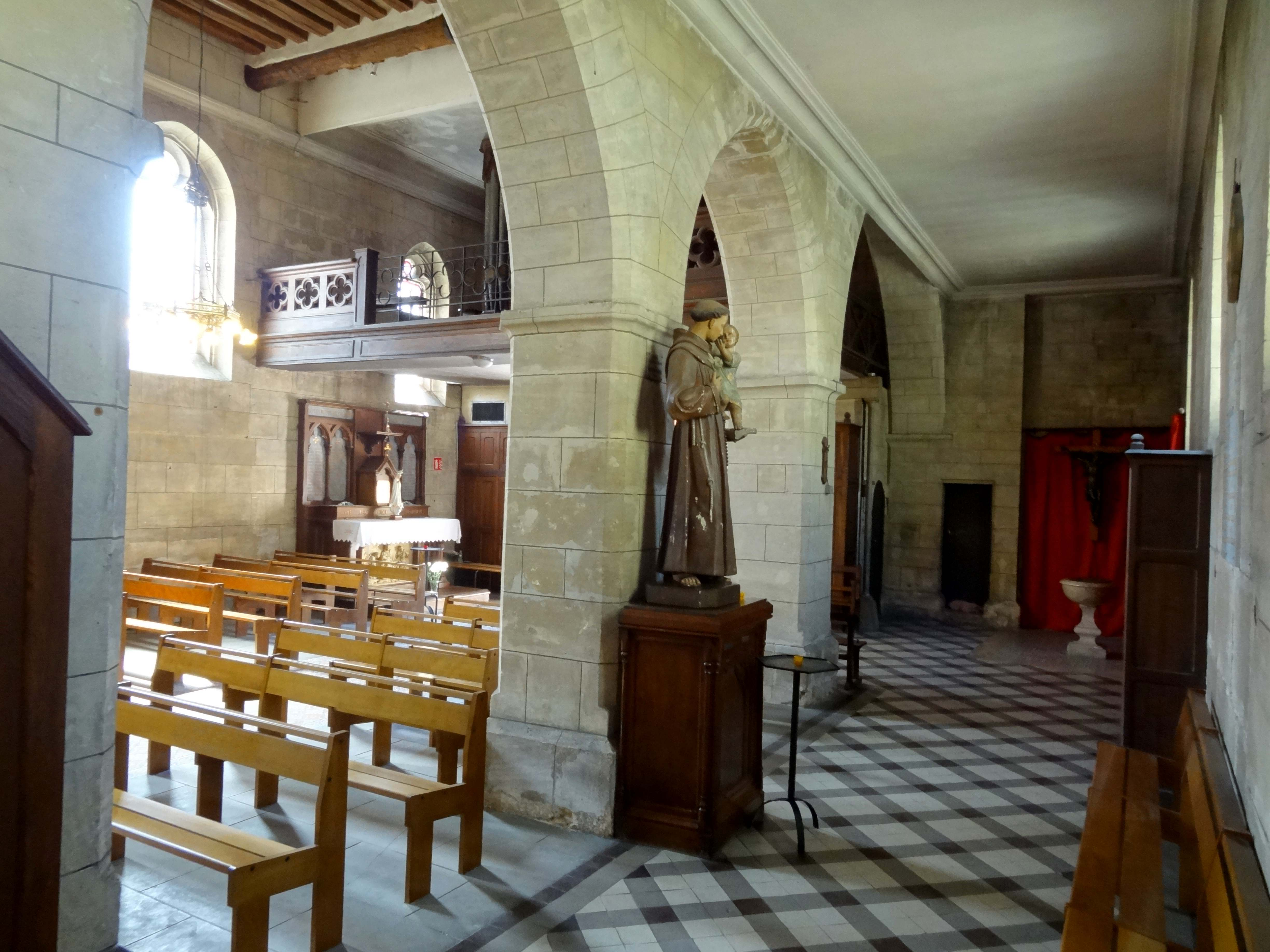 Intérieur de l'église - voir titre.